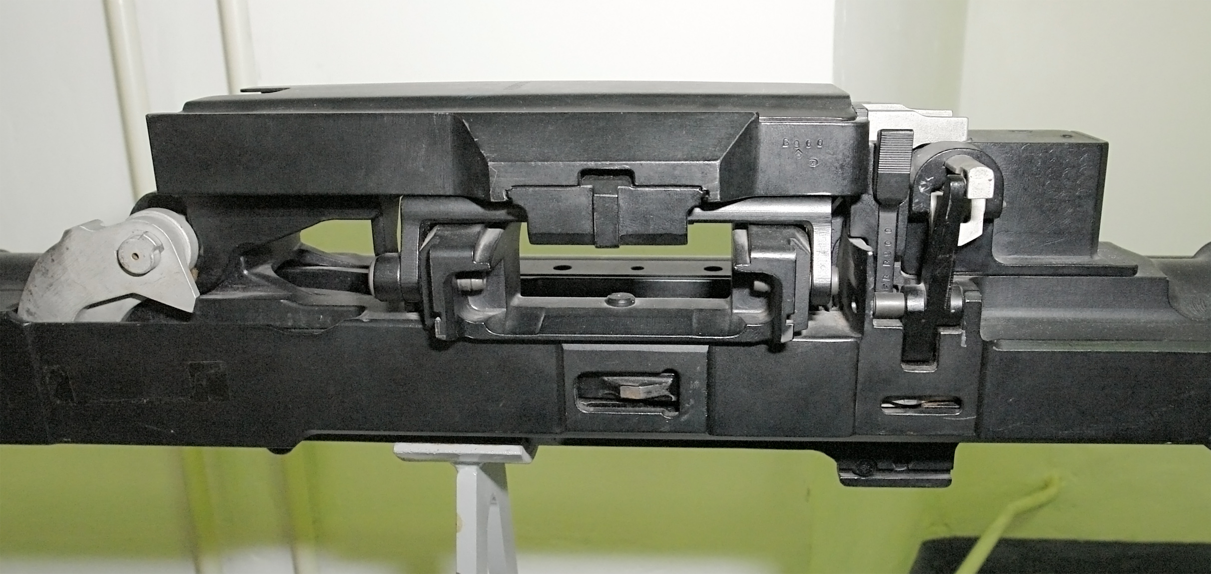 30-мм авиационная пушка НР-30 (Нудельман - Рихтер). Принята на вооружение в 1955 г. Главный конструктор - А.Э. Нудельман, КБТМ. Тактико-технические данные этой пушки были весьма высоки. По сравнению с предыдущими образцами она отличалась рядом оригинальных решений и стала основным оружием истребителей. Состояла на вооружении около 40 лет. , Скорострельность - 900 выстр/мин. Начальная скорость - 780 м/с Масса пушки - 66 кг. Масса снаряда - 410 г Военно-исторический музей артиллерии, инженерных войск и войск связи, Санкт-Петербург.